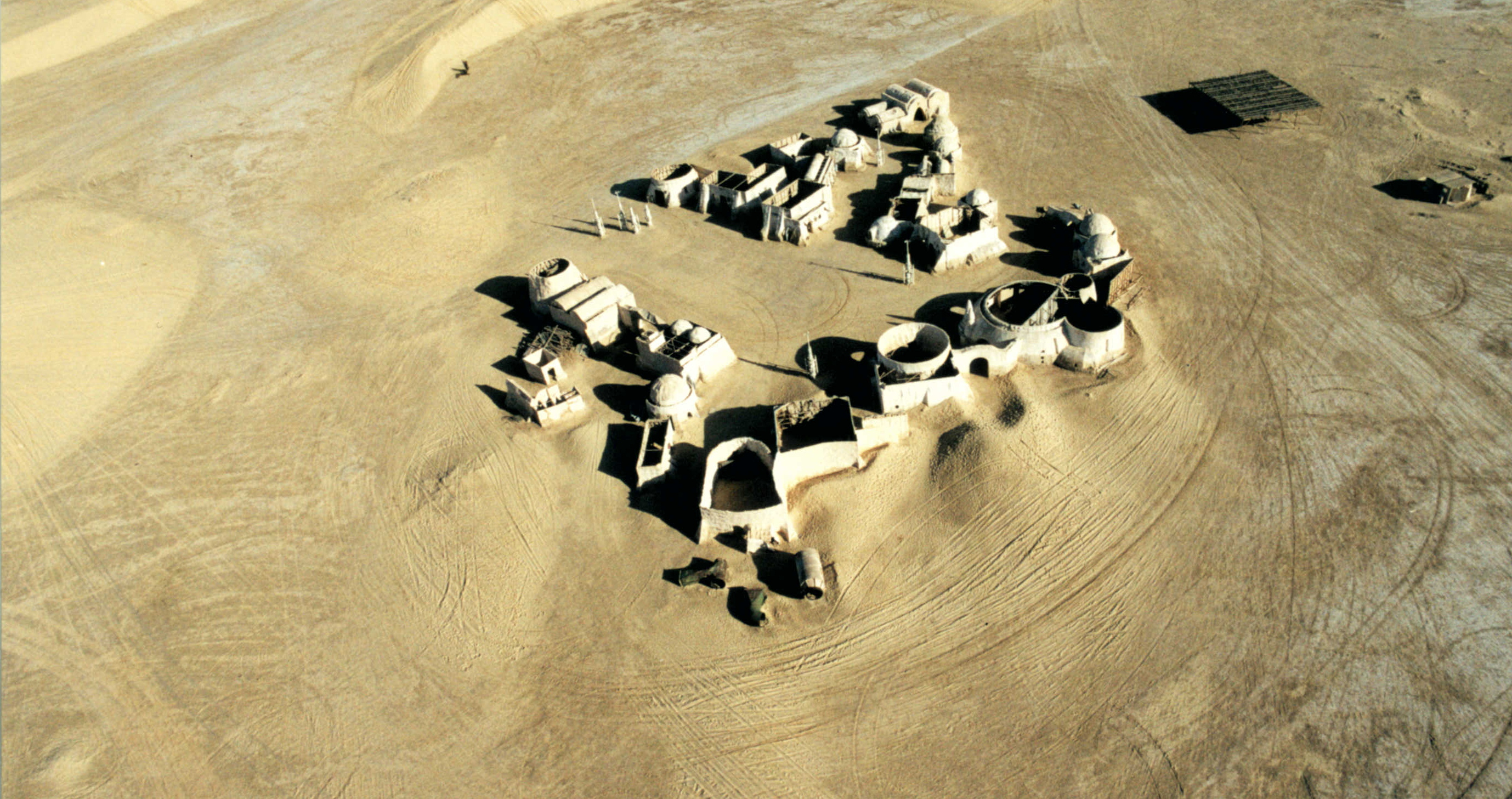 Die Starwars-Kulissen bei Tozeur, Tunesien, Luftbild 2002